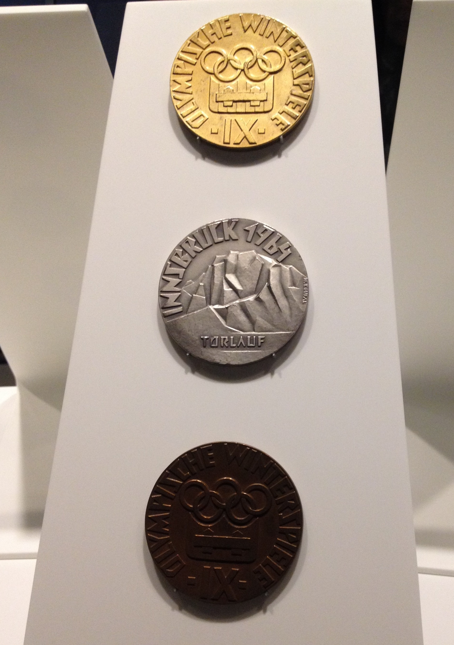 Les médailles des Jeux olympiques d'hiver d'Innsbruck en 1964 exposée au musée olympique de Lausanne, en Suisse.